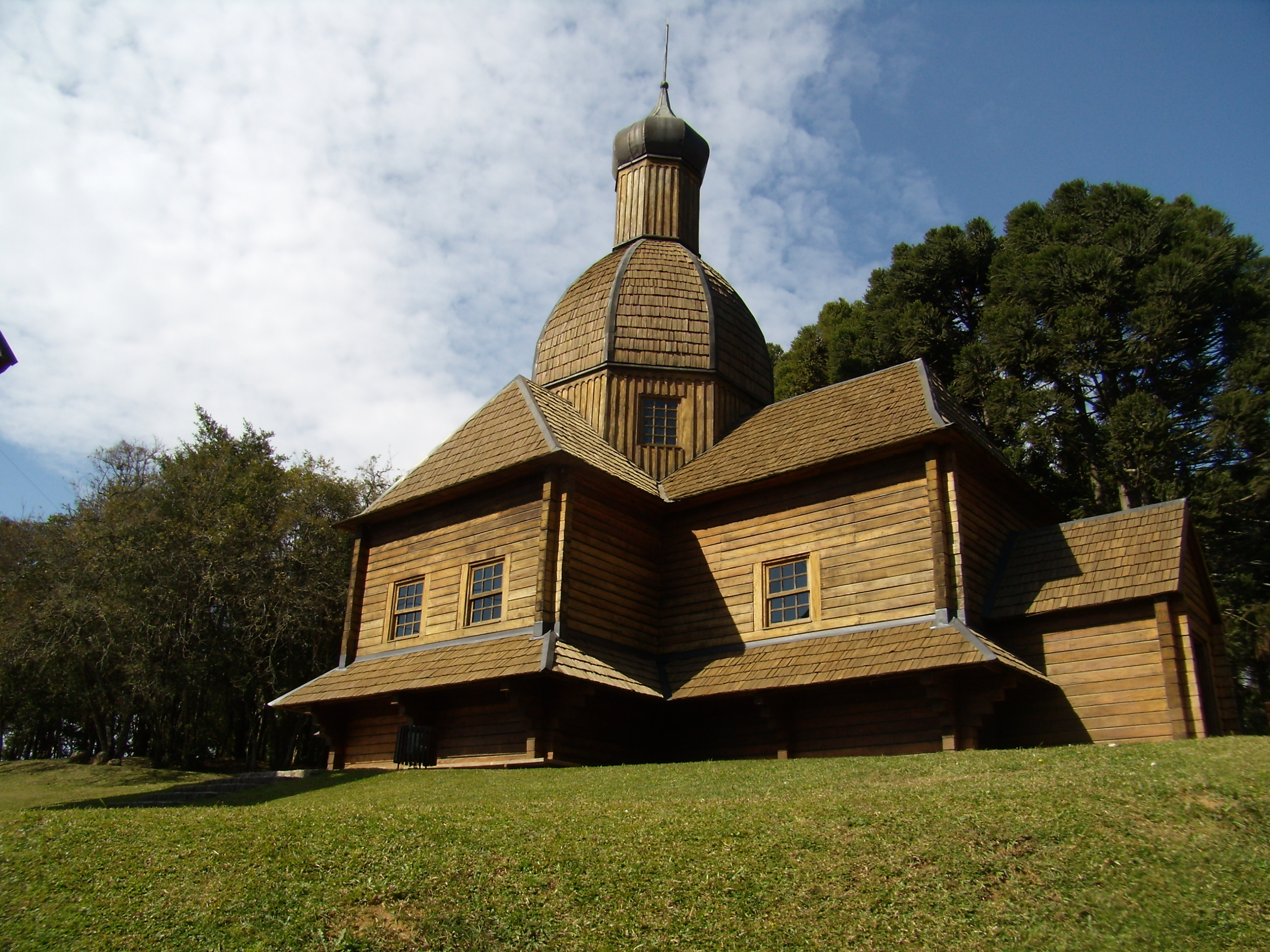 Memorial Ucraniano - Parque Tingui - Curitiba